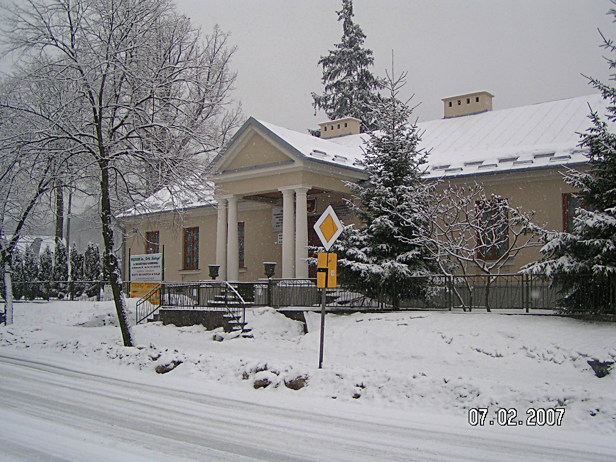 Muzeum Orła Białego